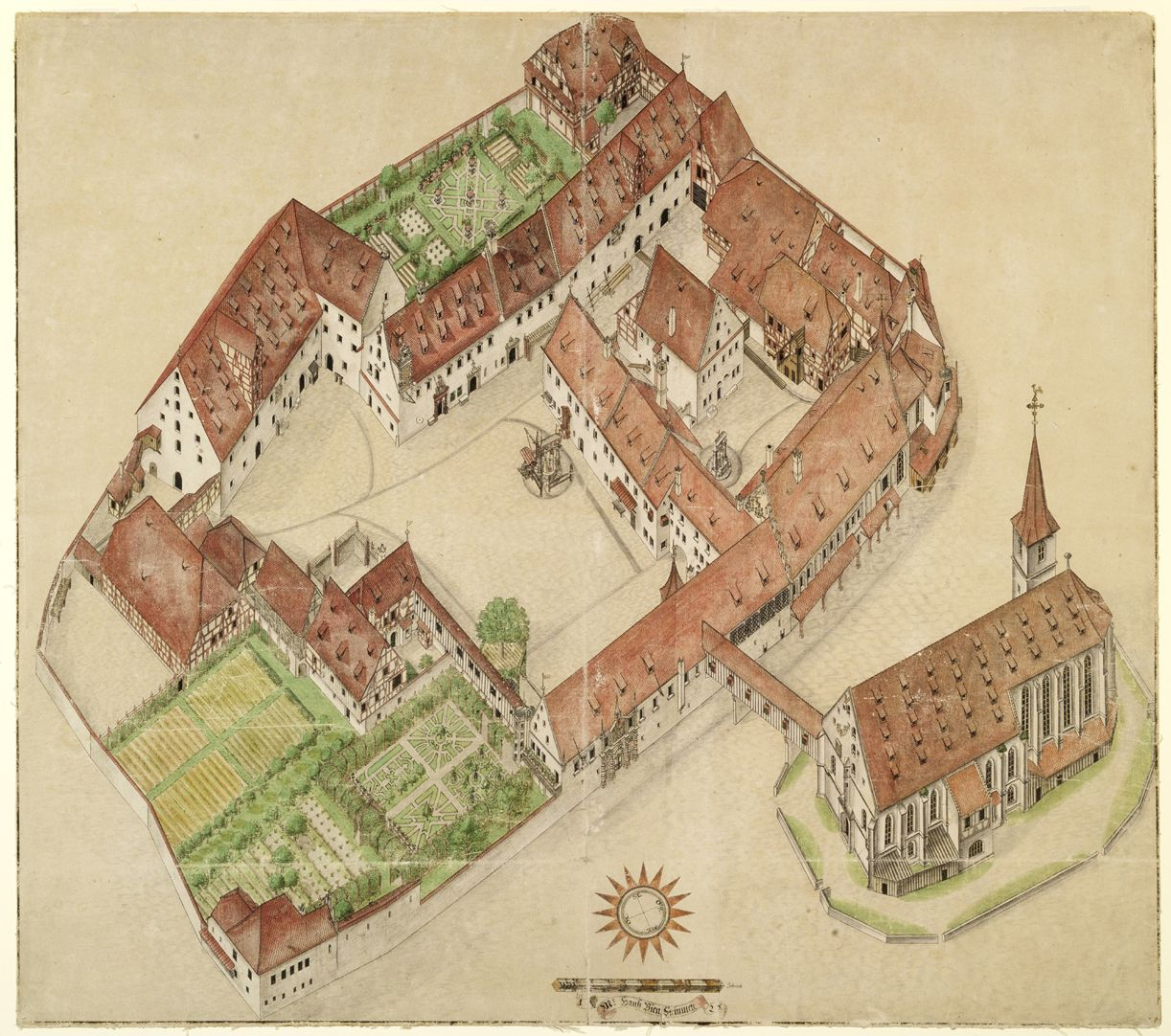 Zeichnung - Nürnberg - Deutsches Haus und Jakobskirche aus der Vogelschau